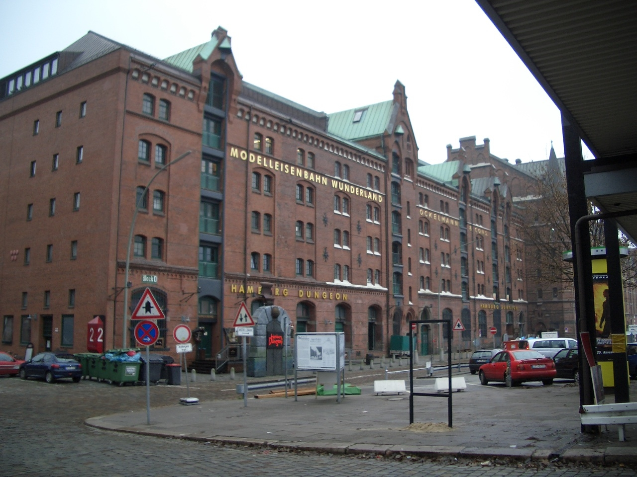 Speicher D in der Speicherstadt in Hamburg-Altstadt. Das Gebäude beherbergt heute die Modelleisenbahn "Miniatur Wunderland" und den "Hamburg Dungeon".